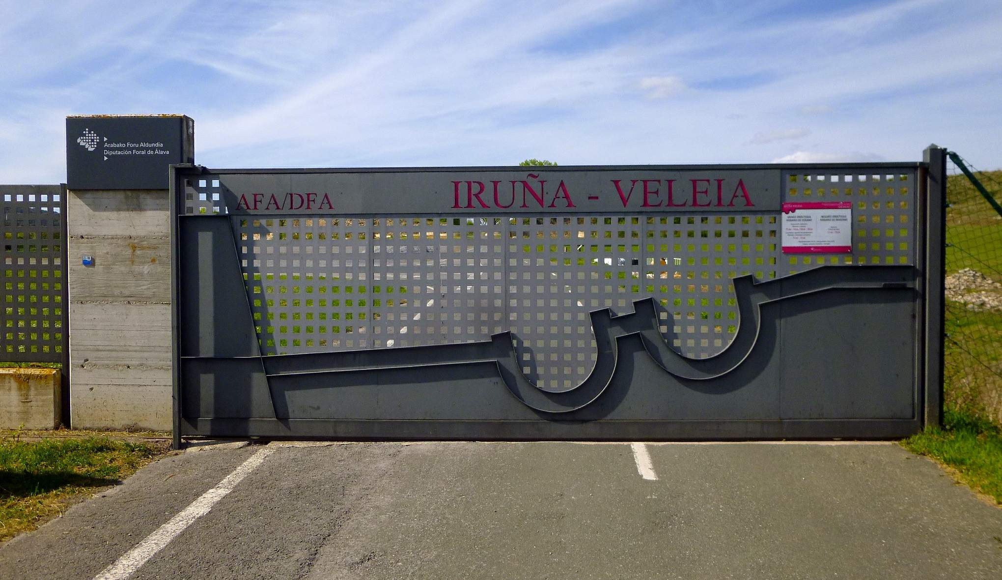 Yacimiento del oppidum romano de Iruña-Veleia (Álava)